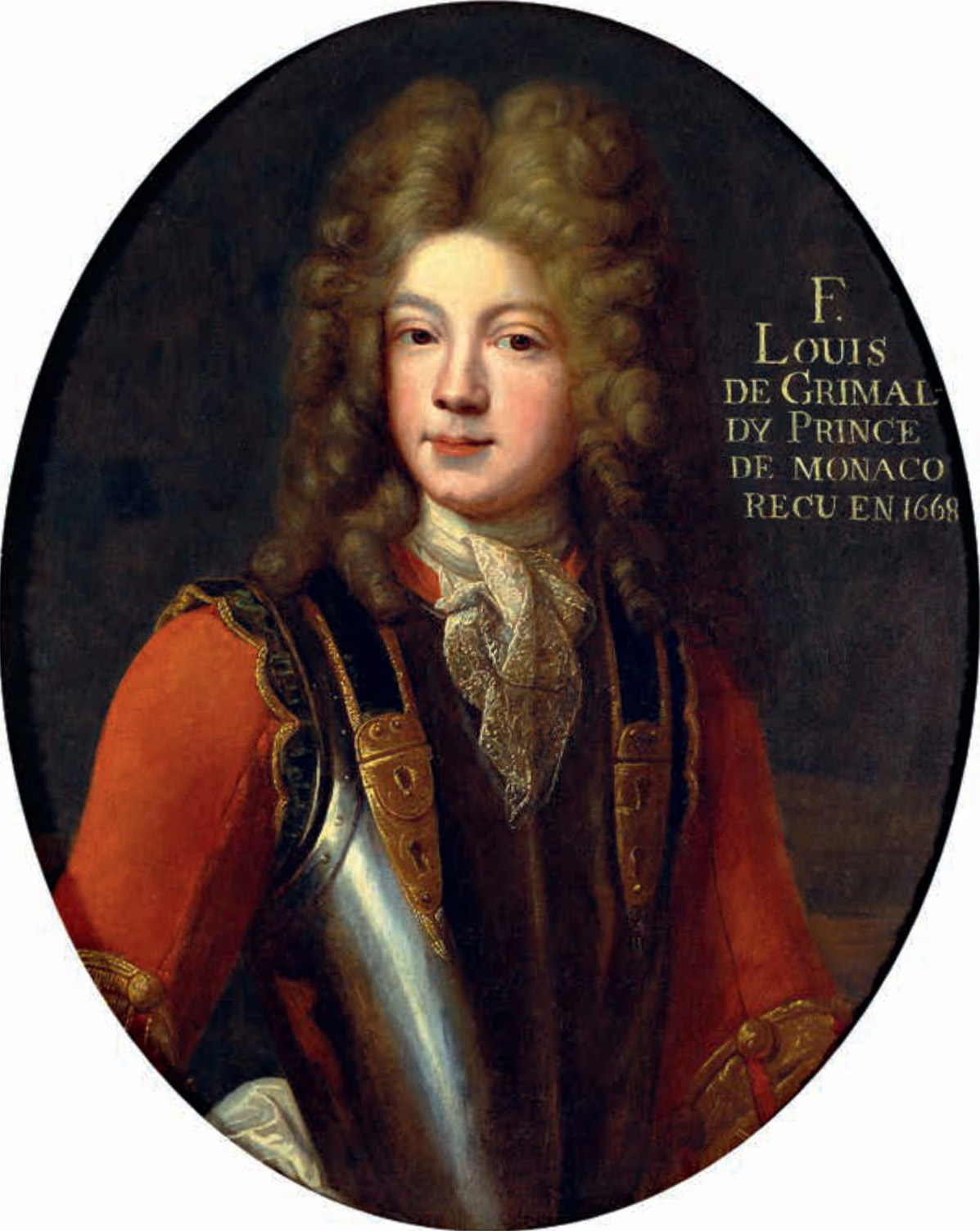 Portrait de Louis Ier de Monaco